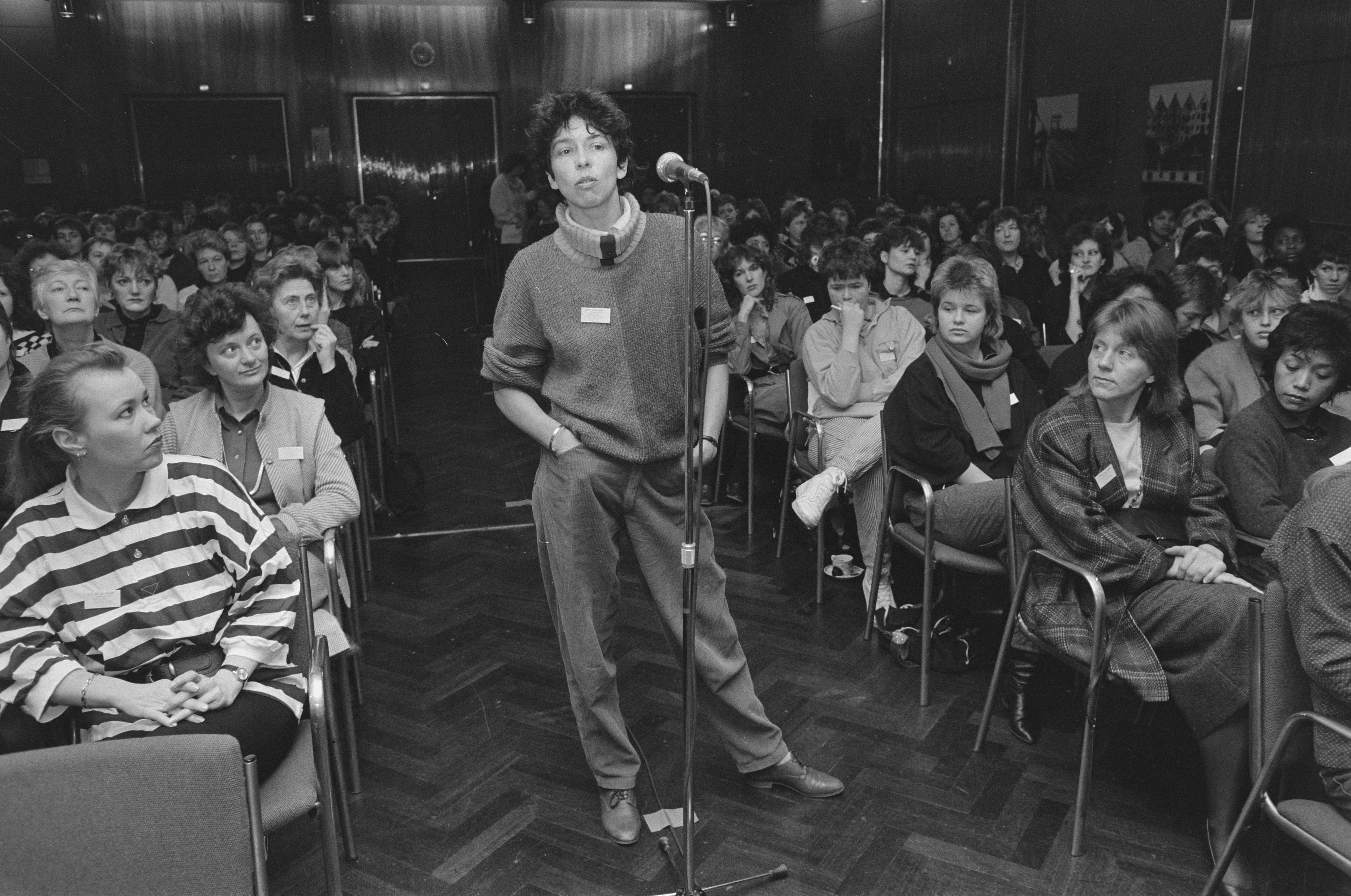 Internationale vrouwendag (8-3): bijeenkomst voor gemeentevrouwen in Krasnapolsky "Seksisme en Racisme als onderdrukkingsmechanisme"; RACISME; VROUWENDAG; bijeenkomsten